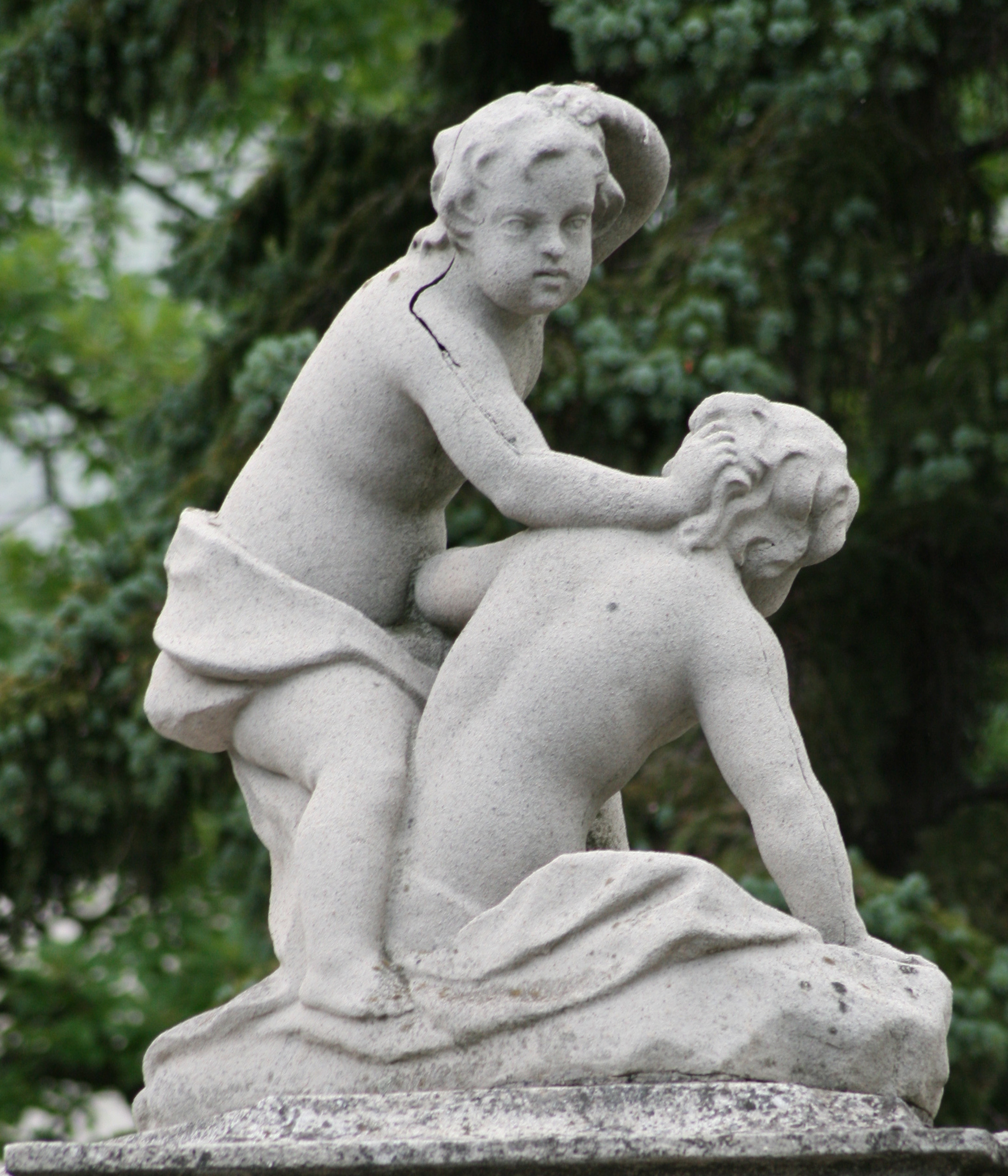 Skulptúra z umelého kameňa na stĺpoch oplotenia Úradu vlády SR